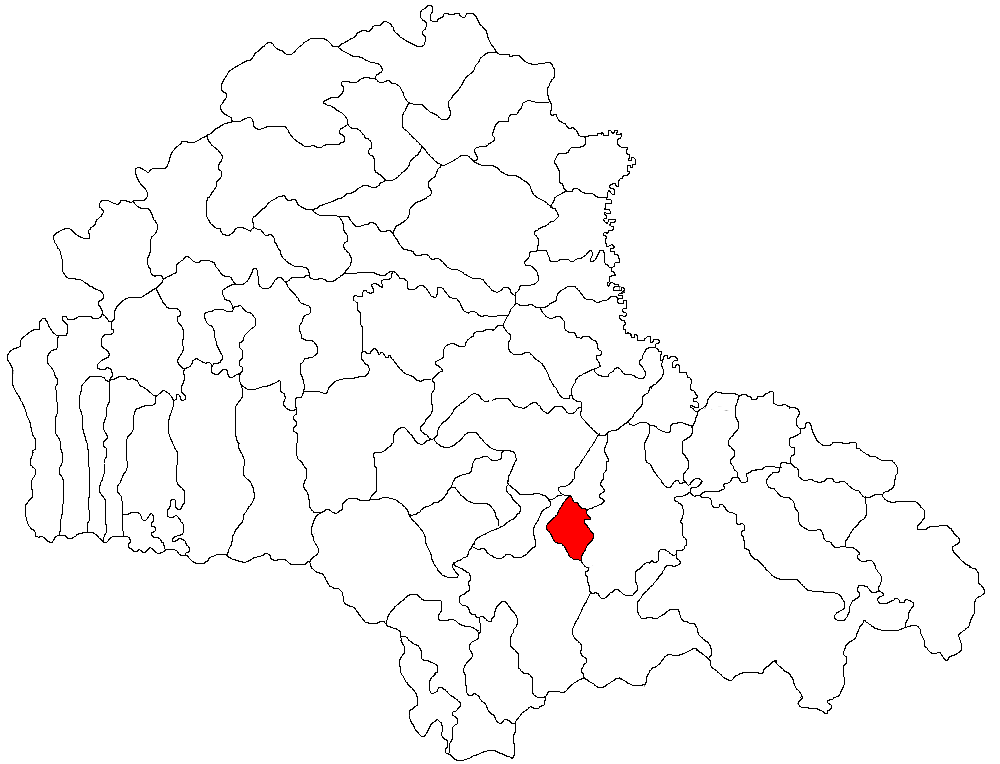 Categorie:Hărţi ale judeţului Braşov